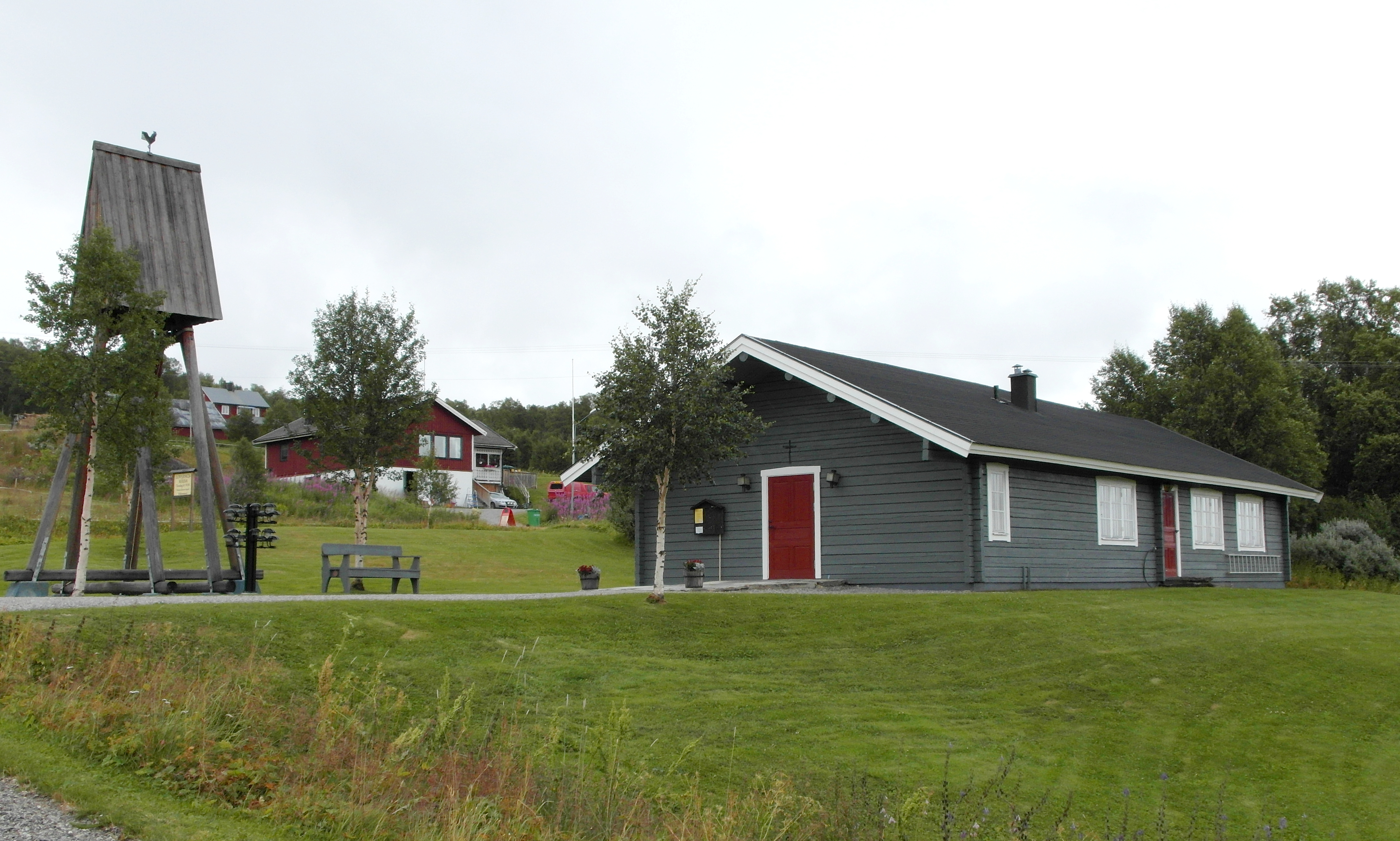 Bruksvallrnas kapell, Härjedalen